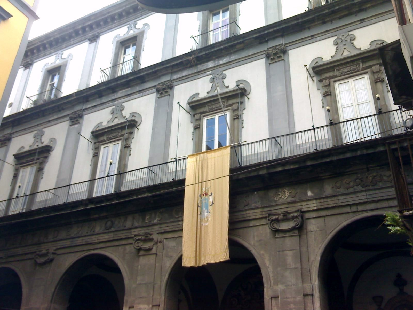 Edificio del Pio Monte della Miserciordia di Napoli